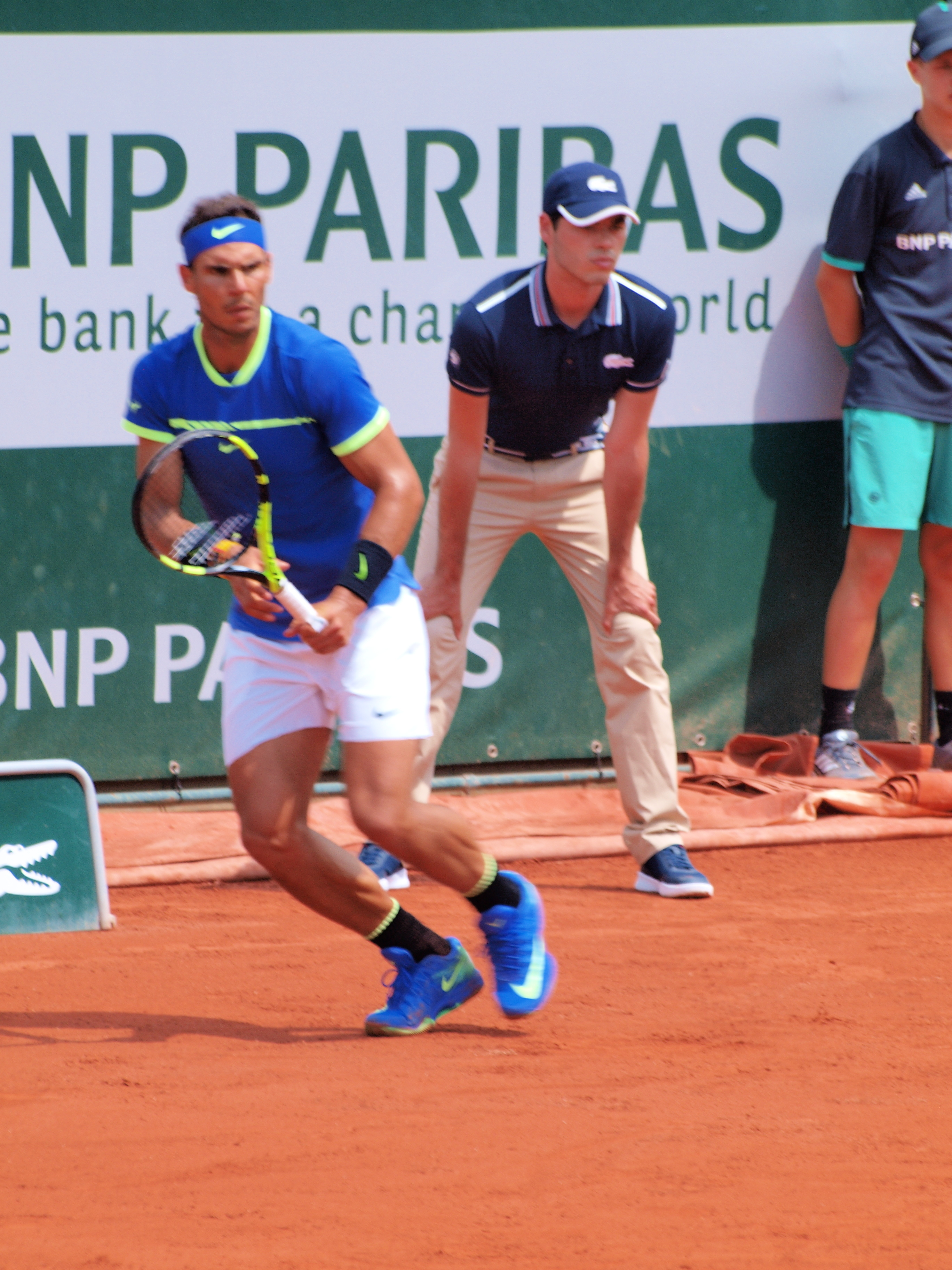 Rafael Nadal lors des Internationaux de France de Tennis au stade Roland Garros de Paris, le 2 juin 2017, durant le match contre Nikoloz Basilashvili.